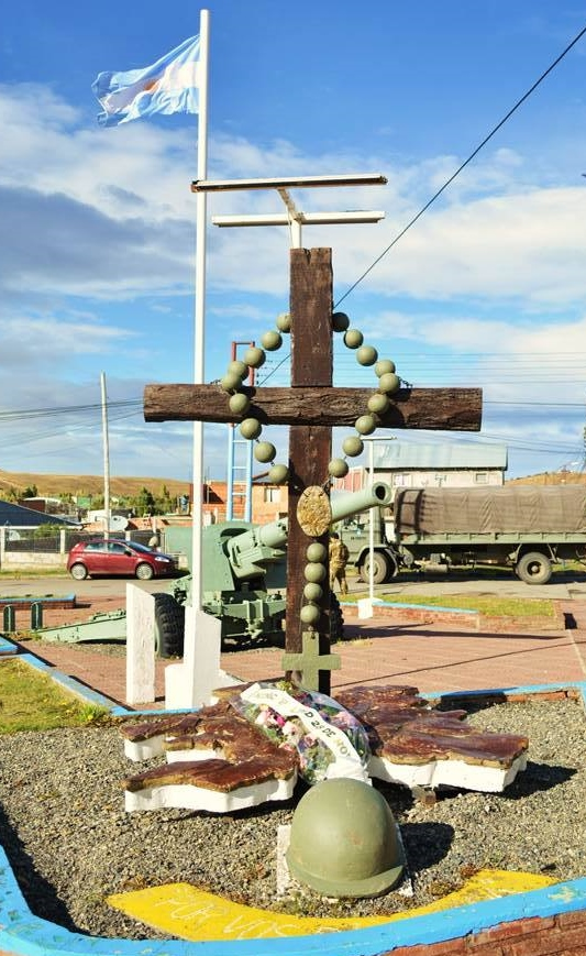 Monumento de Malvinas